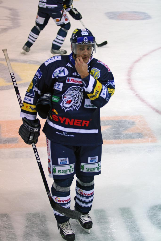 Leoš Čermák, Czech ice hockey player of the Bílí Tygři Liberec, in game Bílí Tygři Liberec vs. HC Slavia Praha 5:2 (0:1,1:1,4:0)